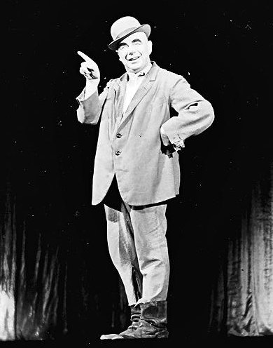 Scala (Berlin): Paul Beckers